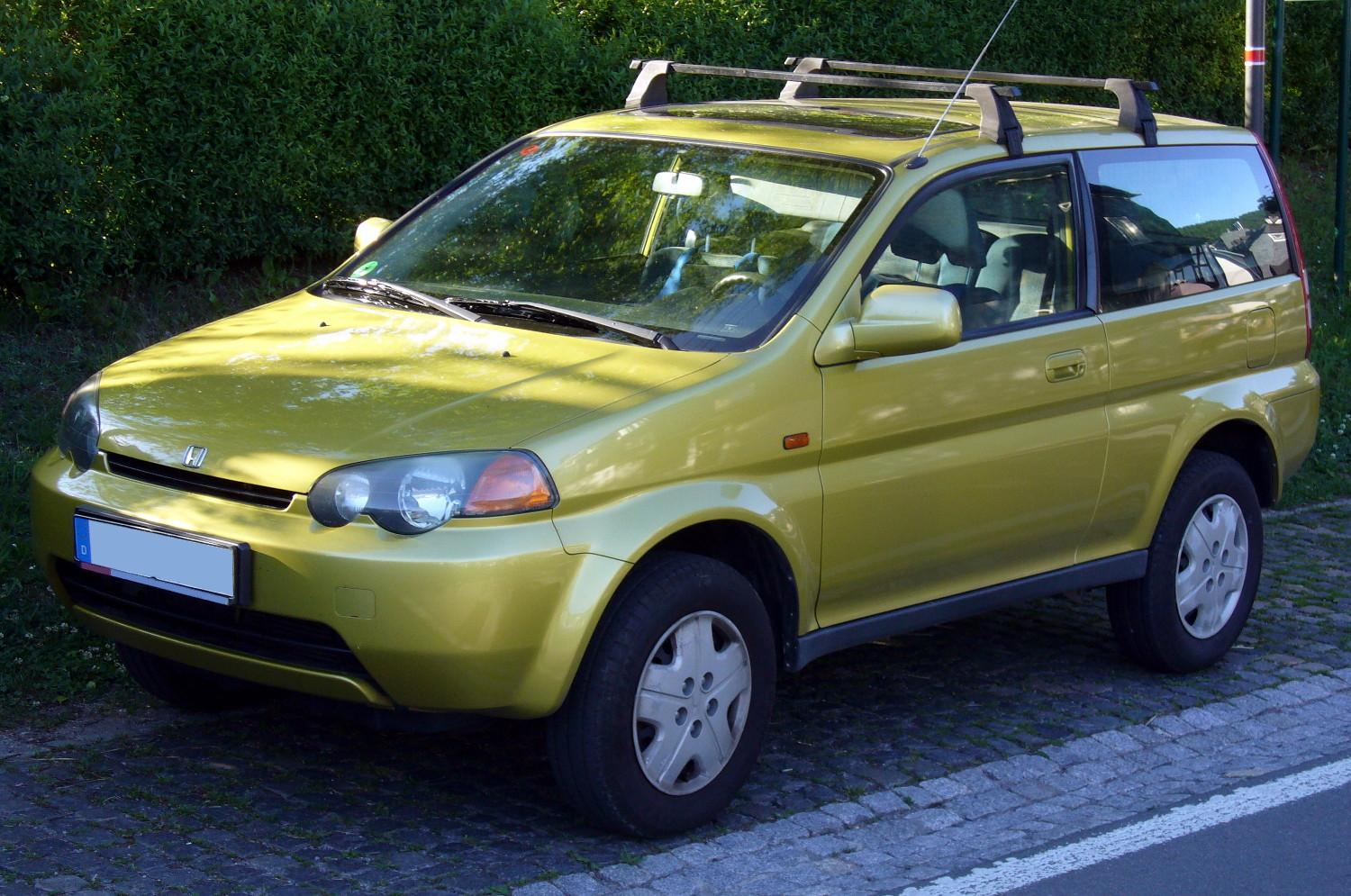 Honda HR-V